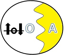 en el mecanismo de la retroflexión, O representa al organismo y A al ambiente, la línea ondulada es el límite de contacto. El círculo y las flechas son el trazado sobre el sí mismo.